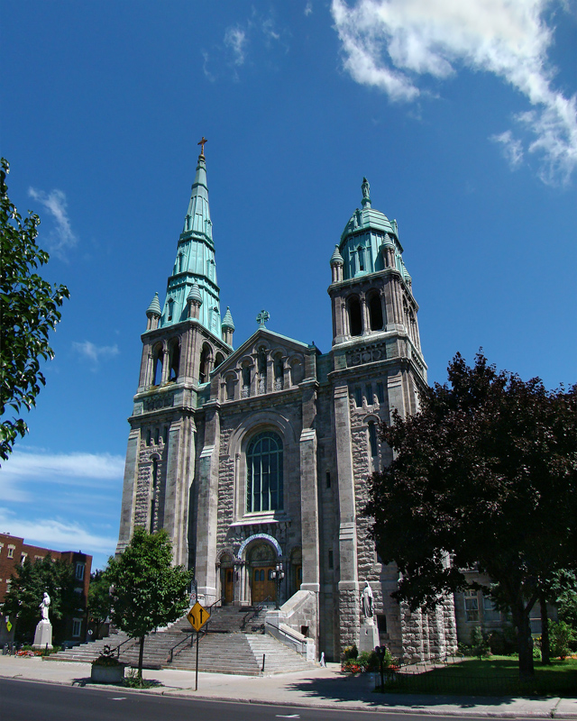 Église Notre-Dame-du-Saint-Rosaire de Villeray, Montréal, Québec, Canada.